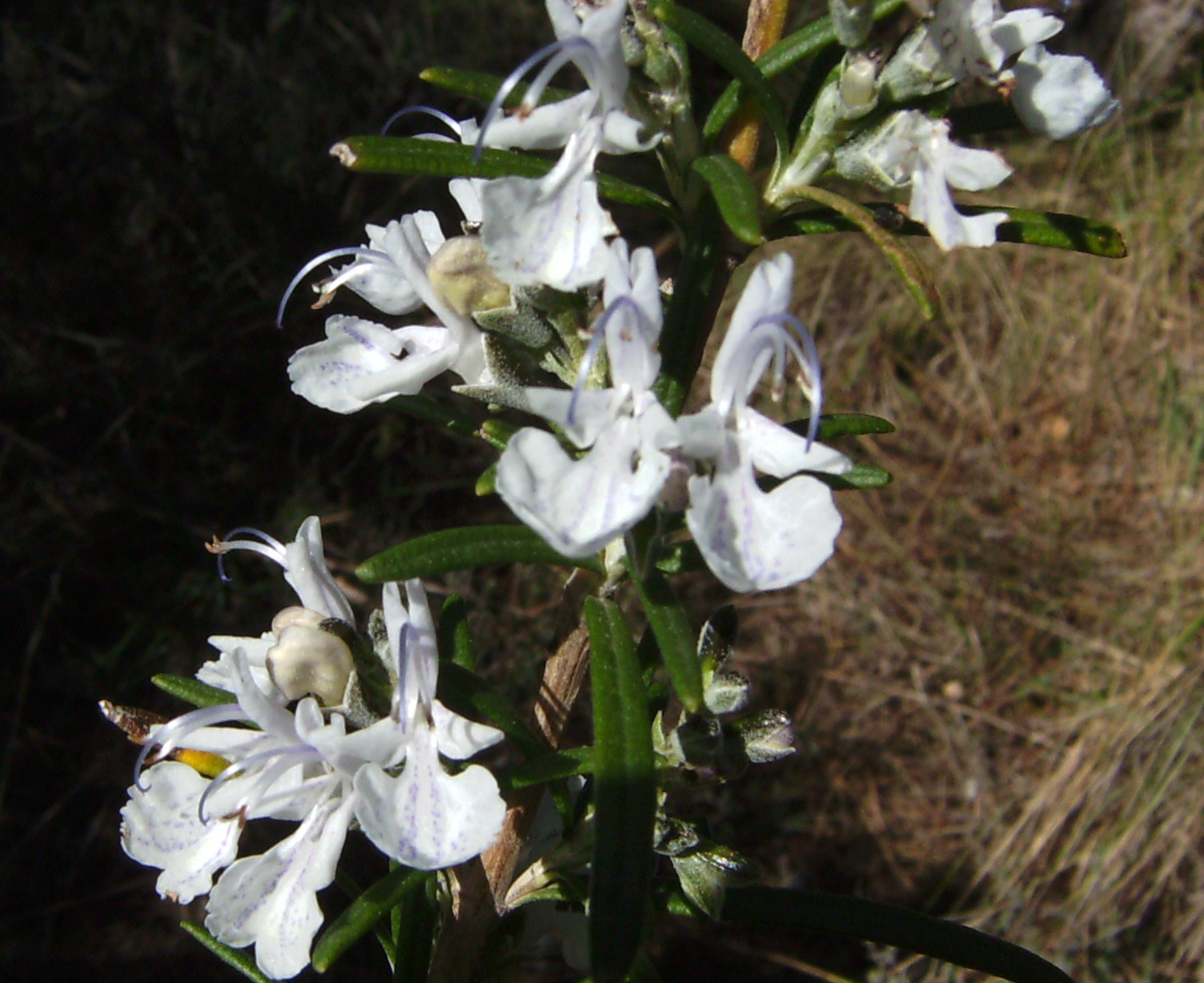 Flors de romaní, Rosmarinus officinalis, a Castelltallat